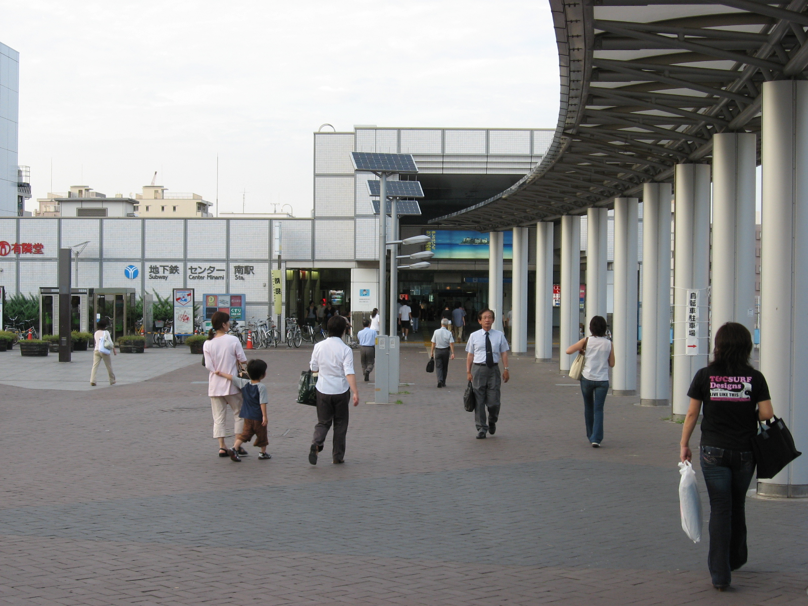 2006年8月29日、利用者自身の撮影。